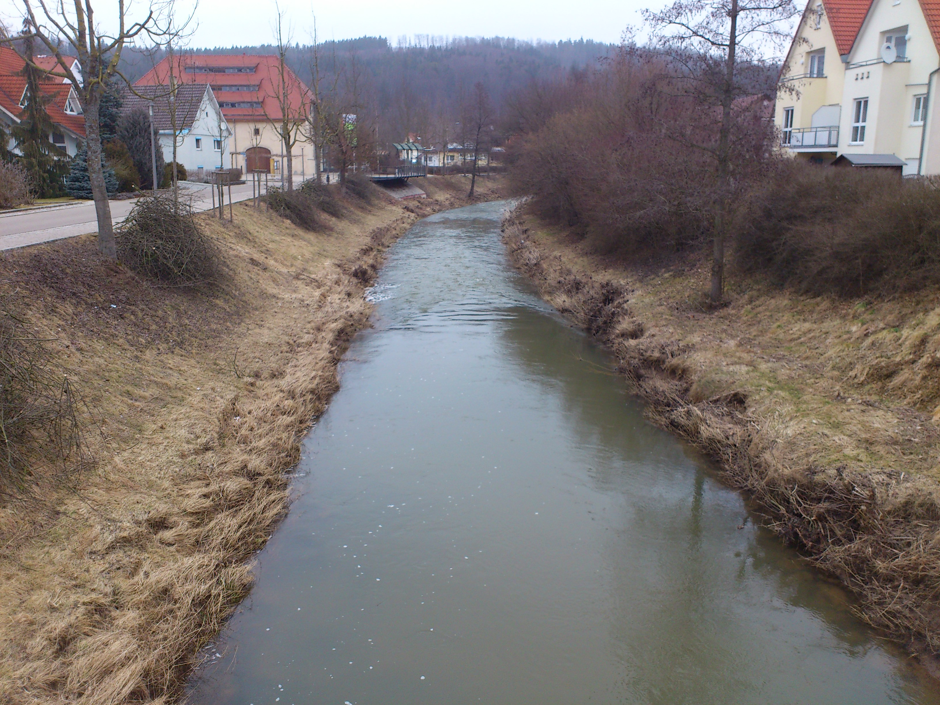 Die Lein in Absgmünd